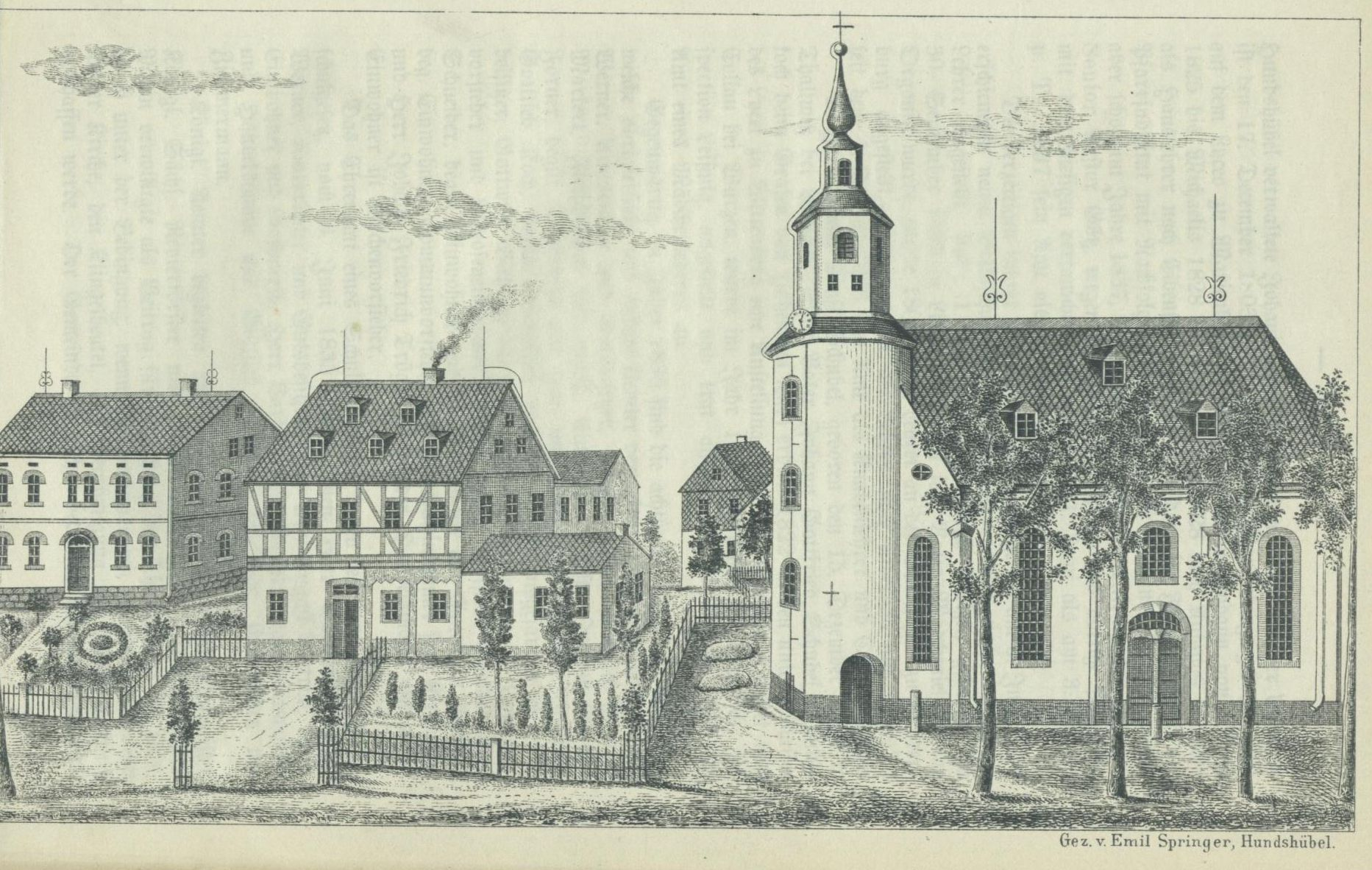 Kirchplatz in Hundshübel, Abbildung abgedruckt in Karl Friedrich Schreyer: Chronik des Kirchdorfes Hundshübel. Zwickau 1889 (Digitalisat in der Staats- und Universitätsbibliothek Dresden)